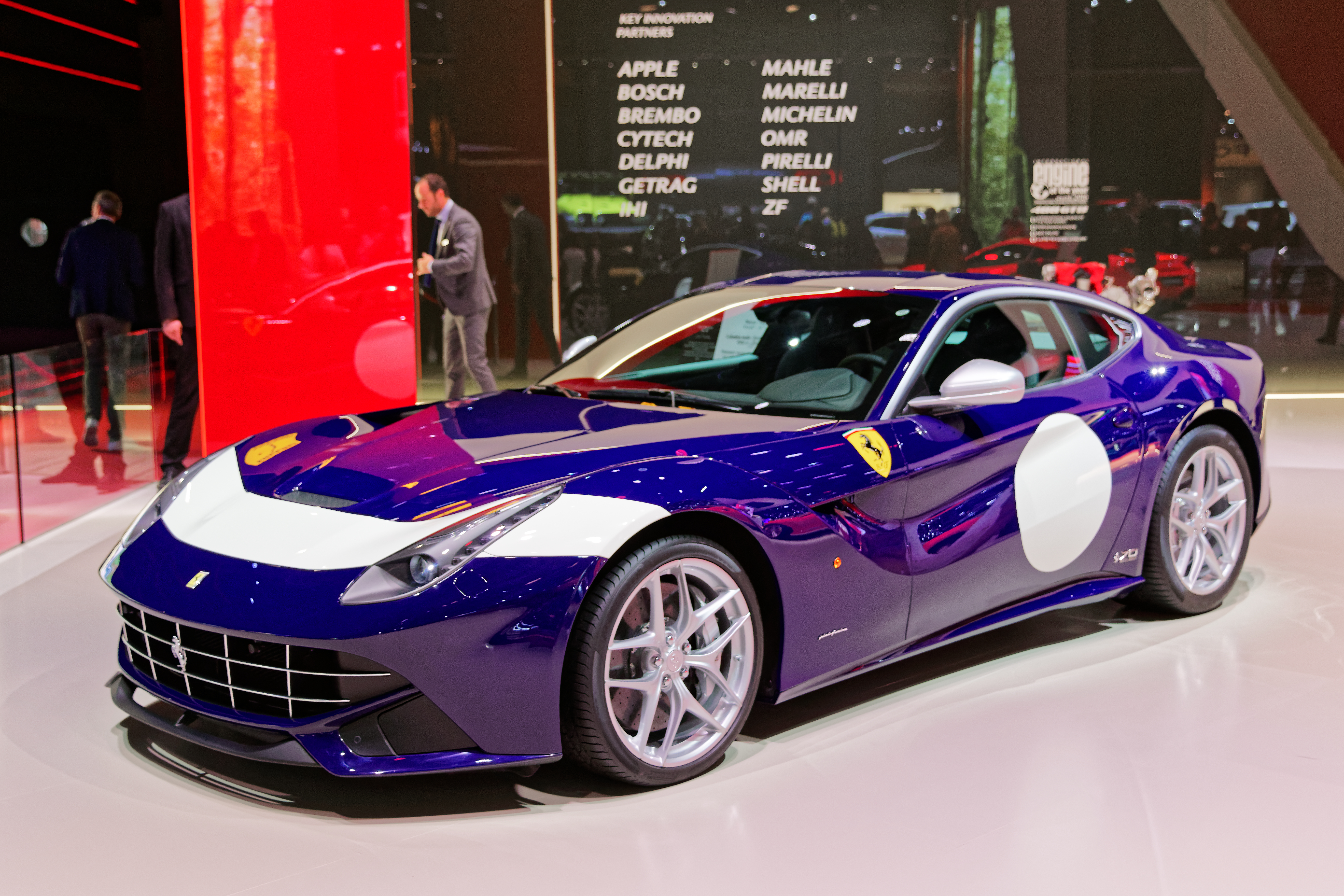 Une Ferrari F12 Berlinette présentée lors du mondial de l'automobile de Paris 2016.